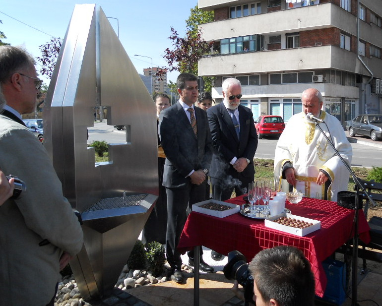 Srpski (latinica): Sa otvaranja spomen-česme Sv. Trojica na Trgu Patrijarha Pavla u Nišu, Srbija. Ova česma je jedna od 17 jubilarnih koje se u ovom gradu grade u povodu proslave obeležavanja 17 vekova od potpisivanja Milanskog edikta.